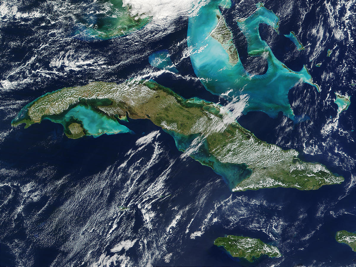 NASA